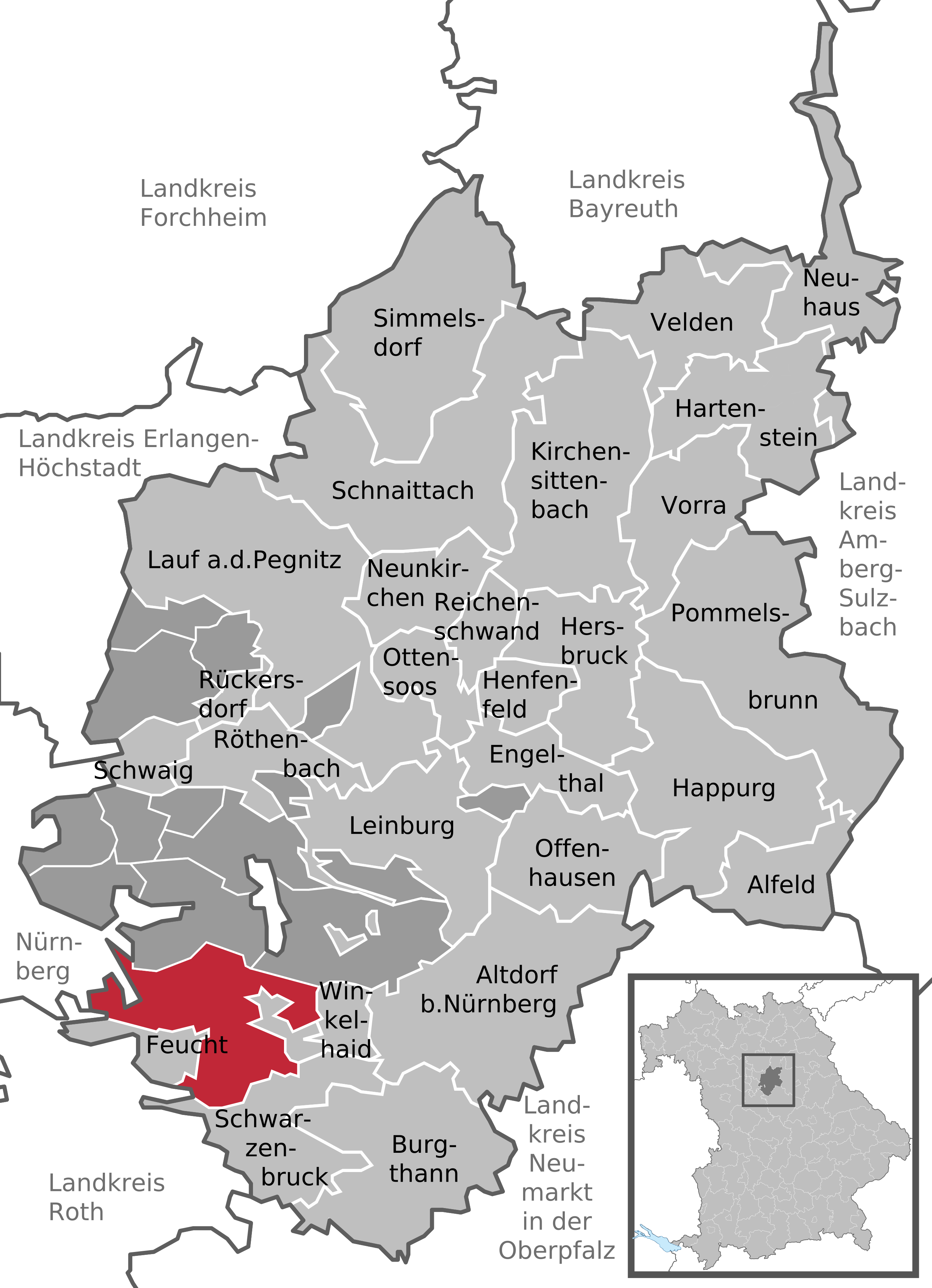 Positionskarte des gemeindefreien Gebietes Feuchter Forst